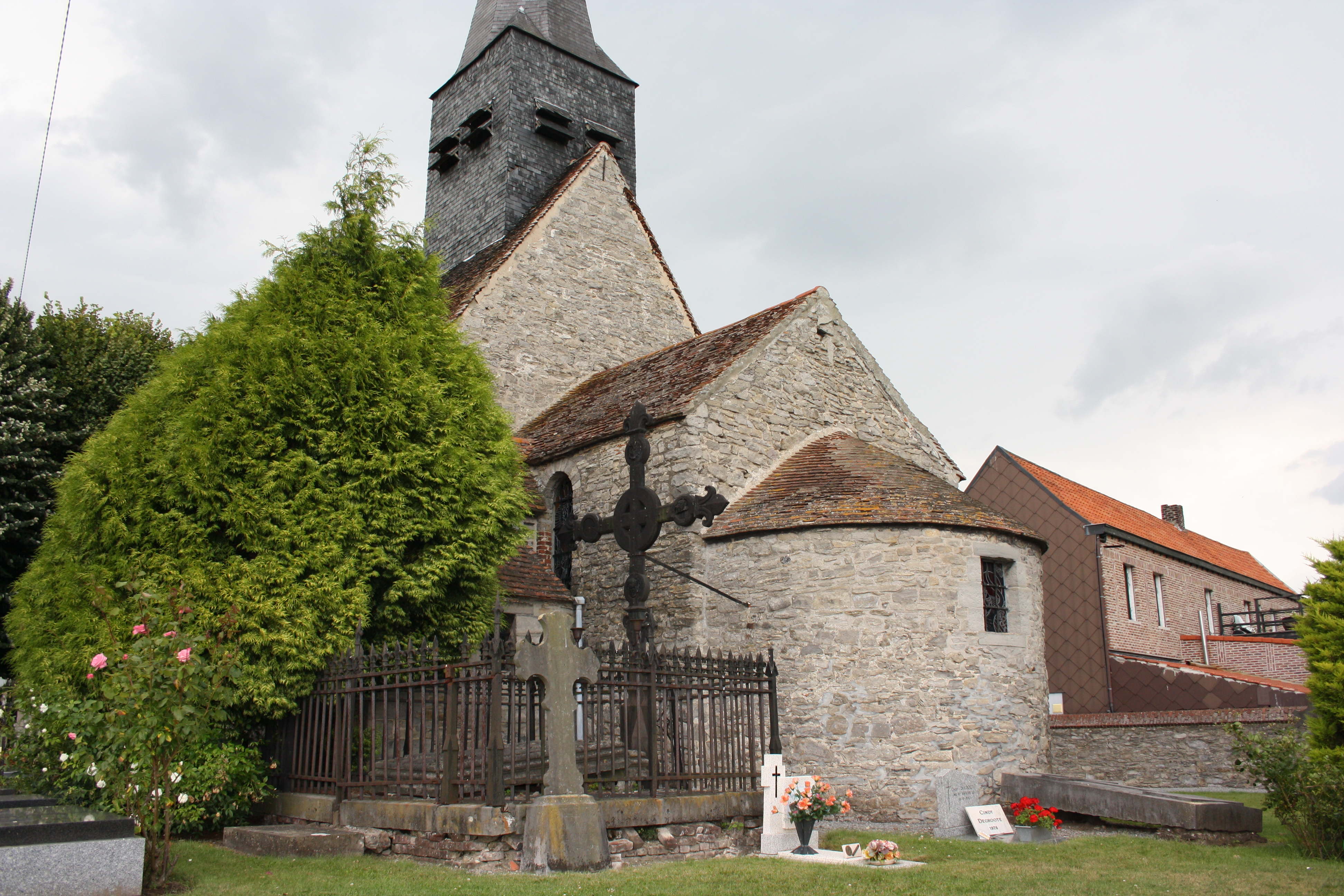 Eglise d'Esquelmes